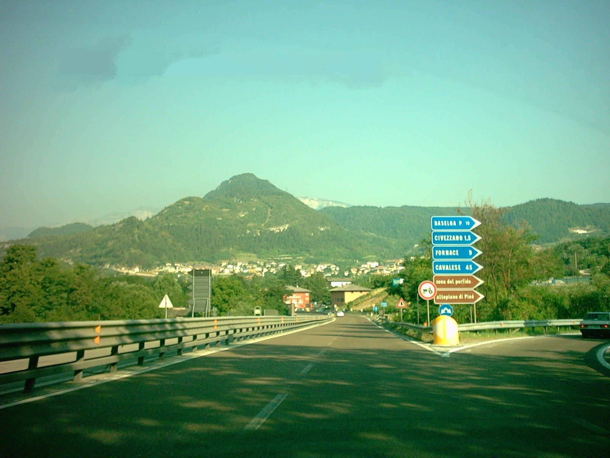 Staatsstrasse 47 (SS 47) bei Civezanno in Richtung Trient